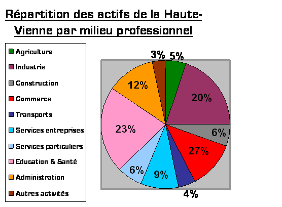 Répartition des actifs du département de la Haute-Vienne selon les différentes catégories de professions